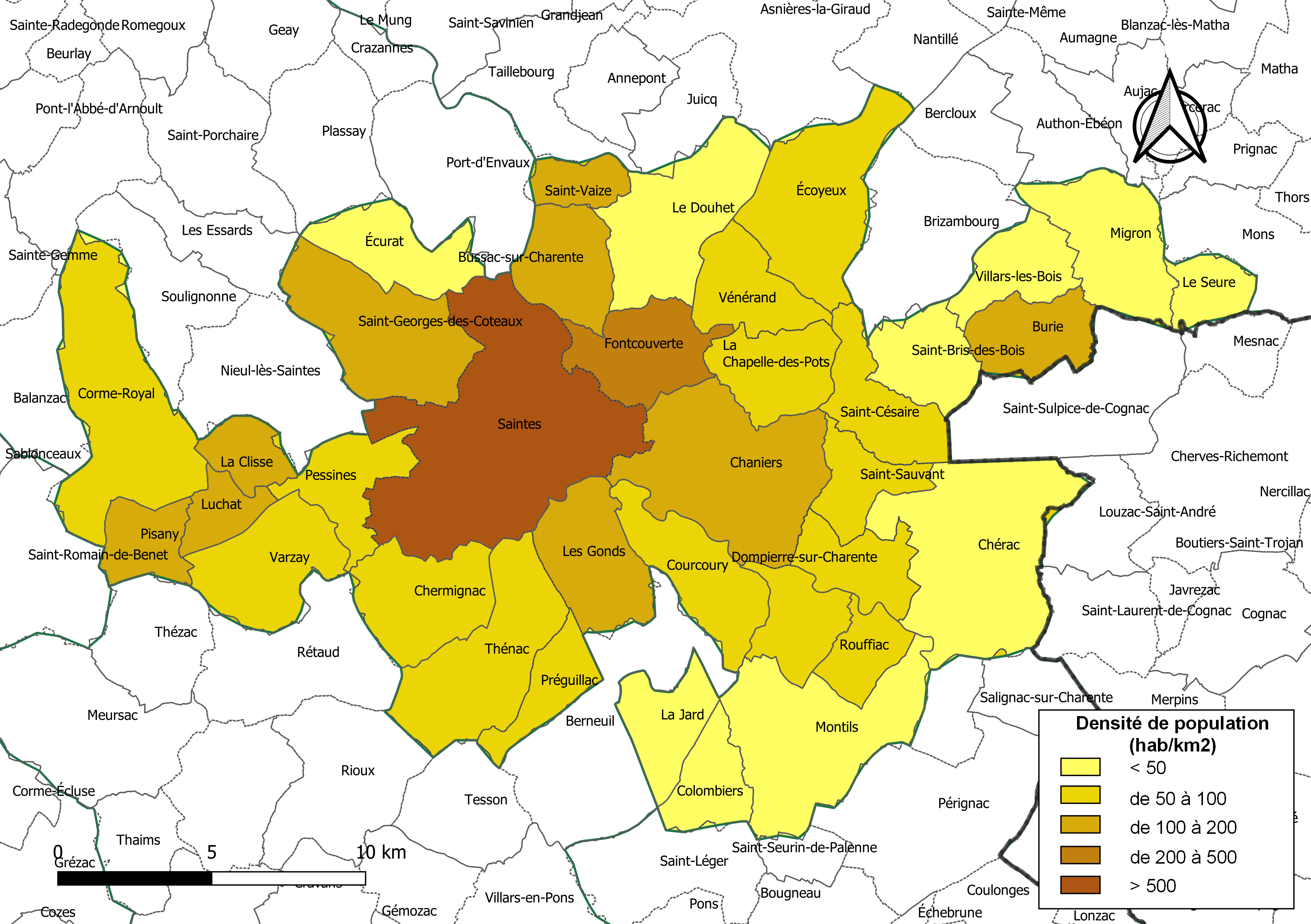 Carte des densités de population (millésimée 2016) des communes de la communauté de communes la Communauté d'agglomération de Saintes, département de la Charente-Maritime, France. Composition au 1er janvier 2019.